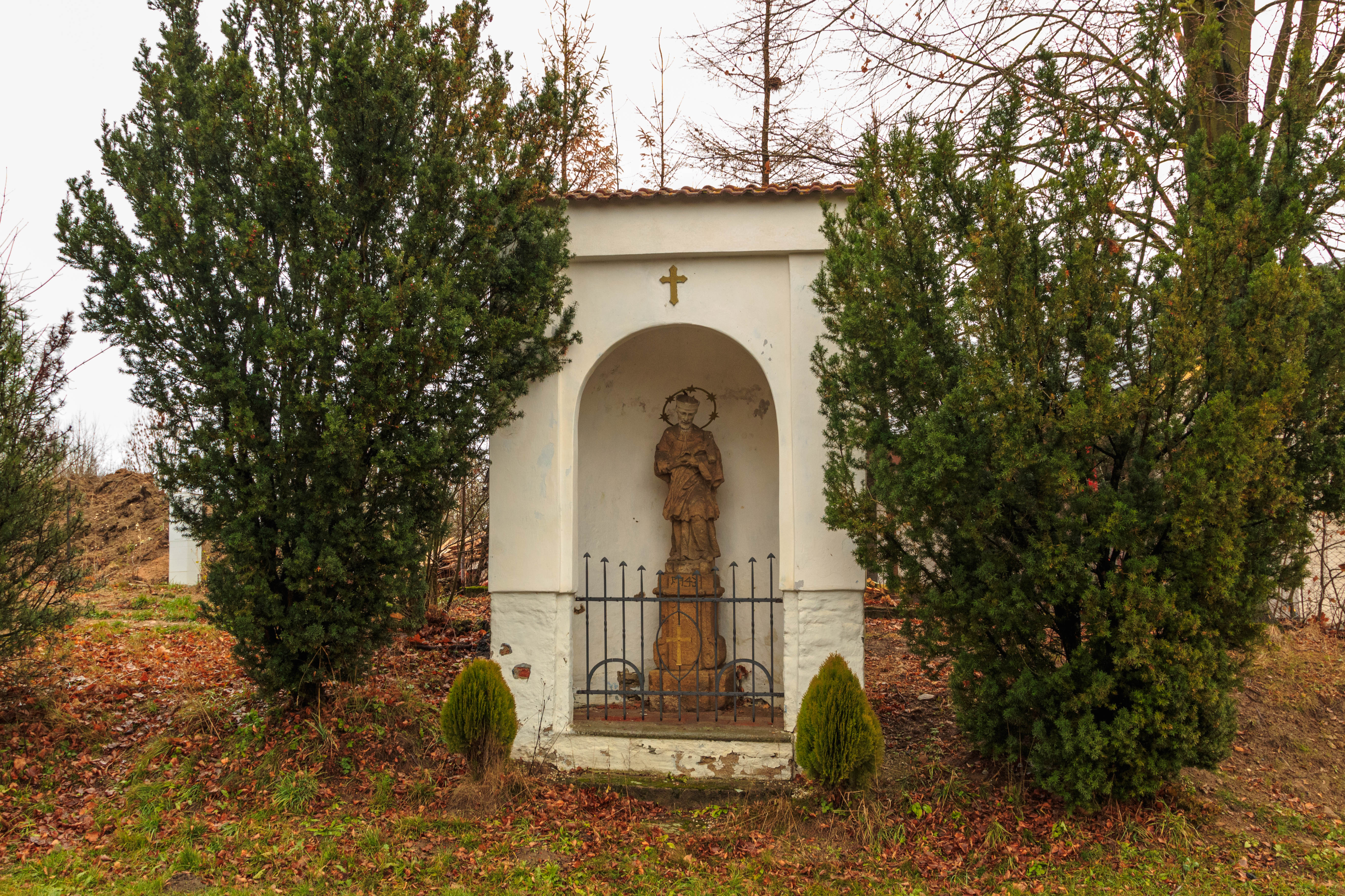 Tis výklenková kaple